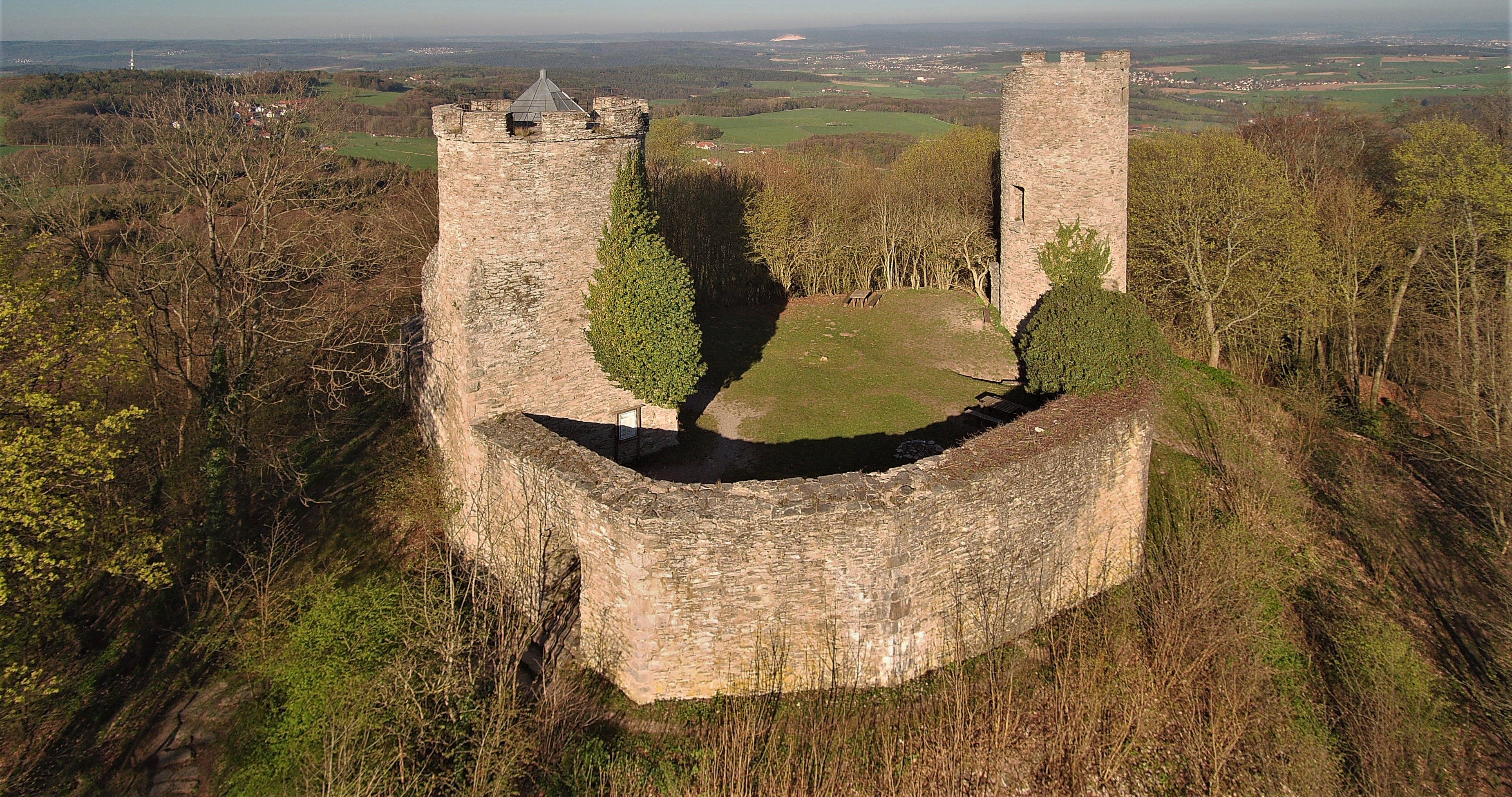 Ruine Ebersburg im Frühjahr 2019 aufgenommen mit einem copter